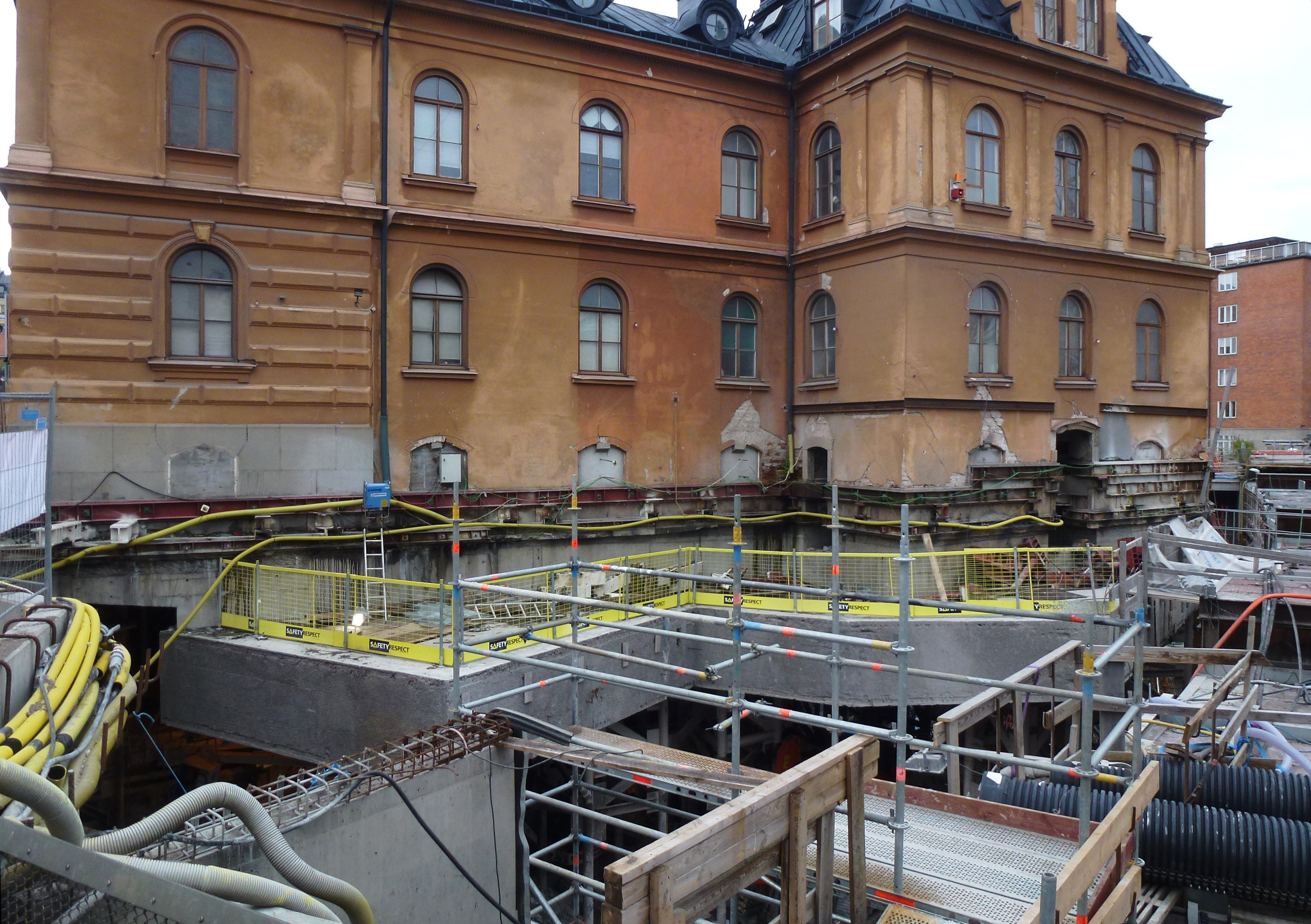 Södermalmstunneln vid Stockholms södra station, tunneln går delvis under Konung Oscar I:s Minne